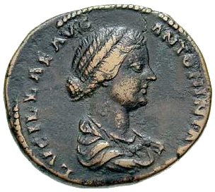 Portret van Annia Lucilla op sestertie.